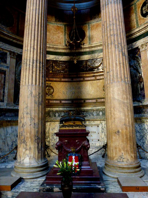 Pantheon Rom Grabstätte des italienischen Königs Umberto 1.von Savoyen